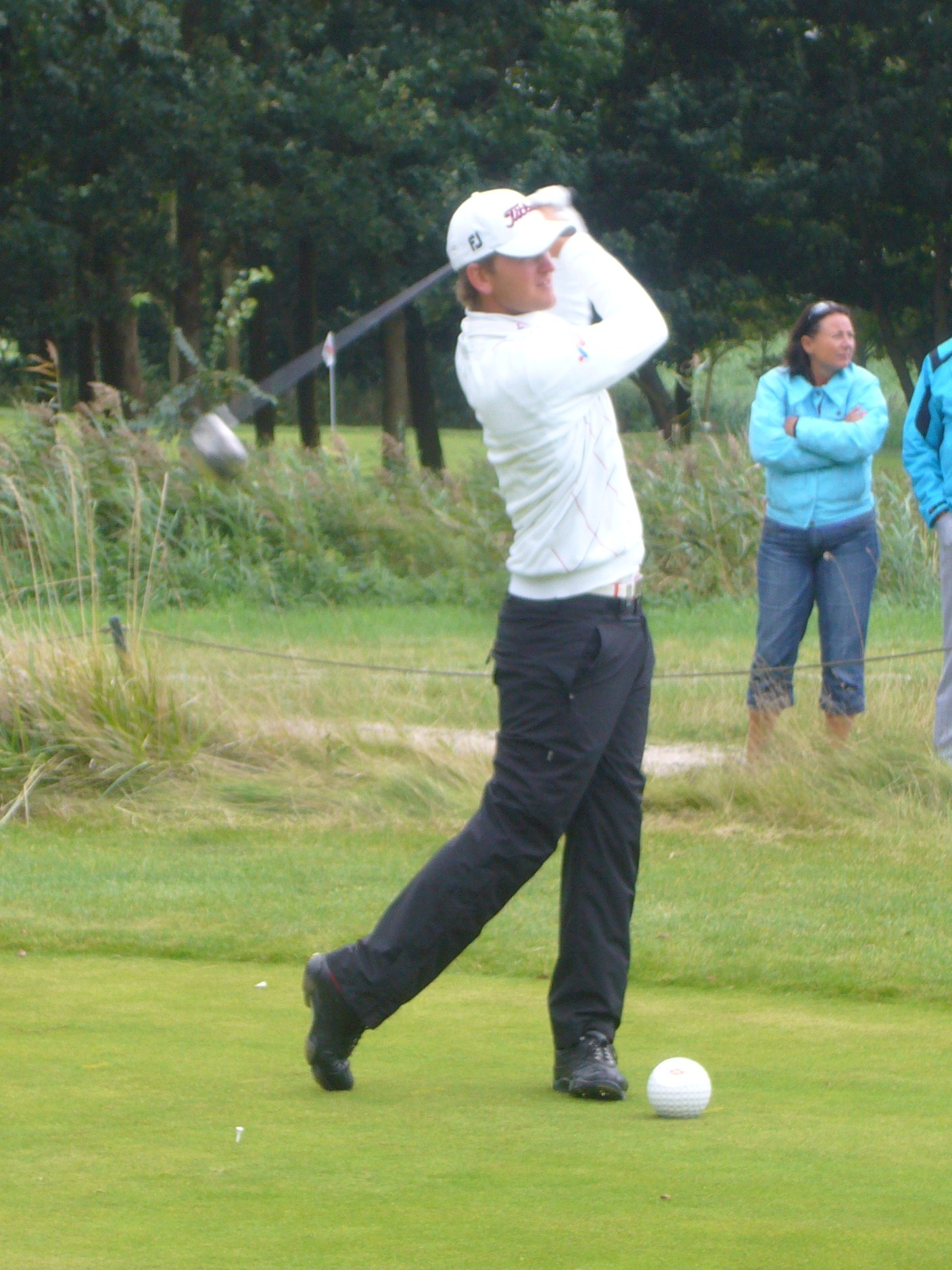 Bernd Wiesberger op Houtrak